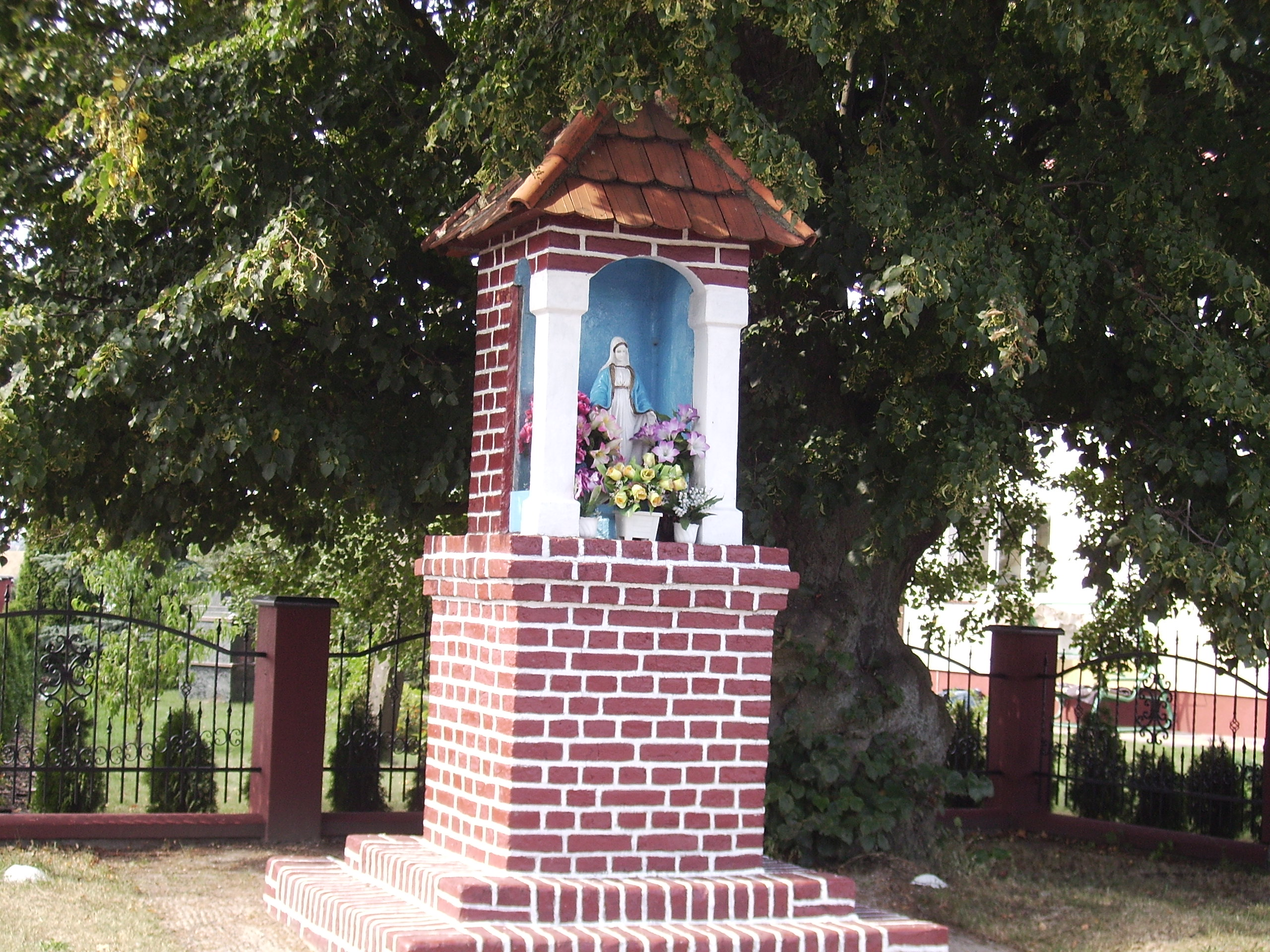 Figurka Maryjna w Folgowie